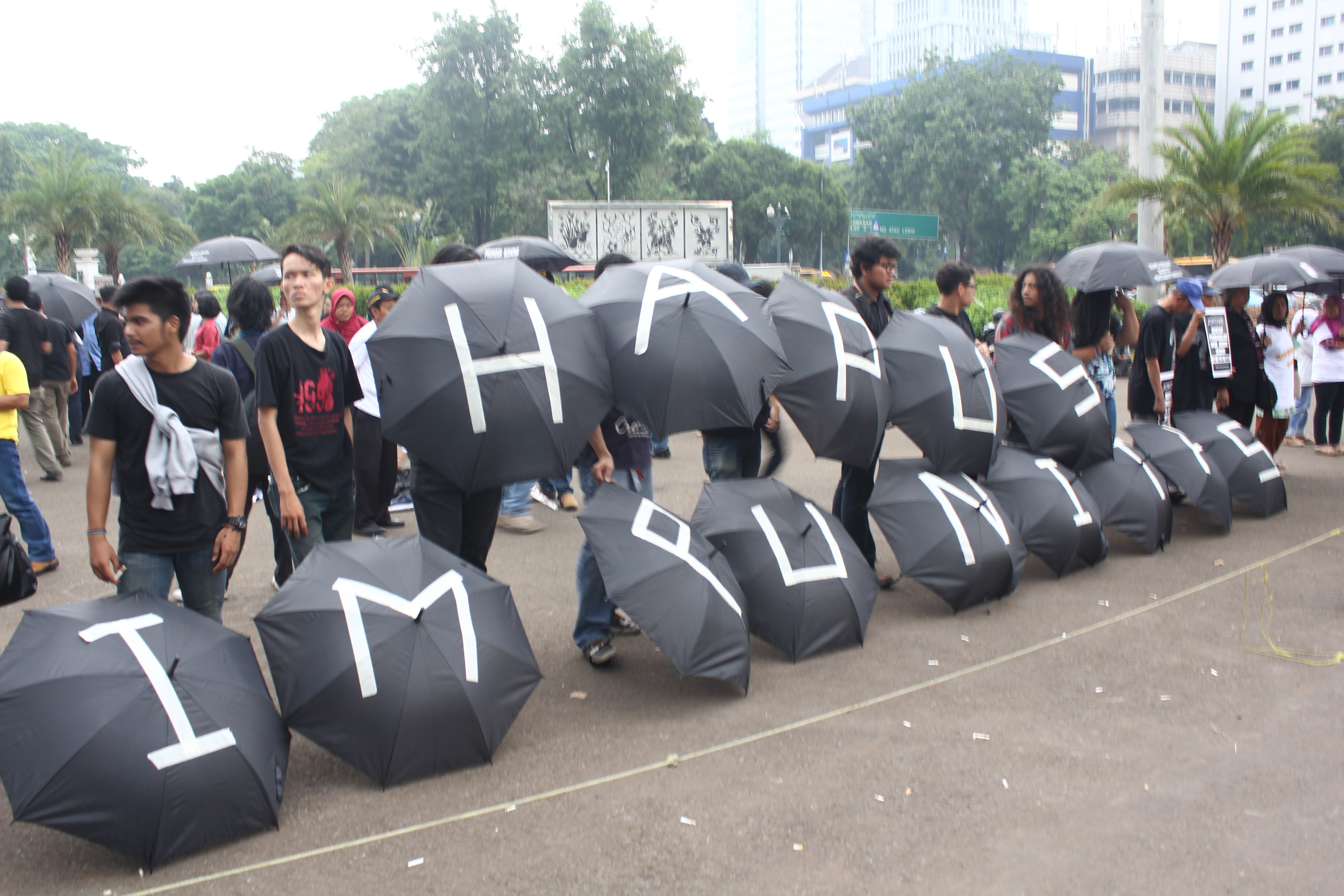 Aksi Kamisan ke 371 pada tanggal 13 November 2014 di depan Istana Negara